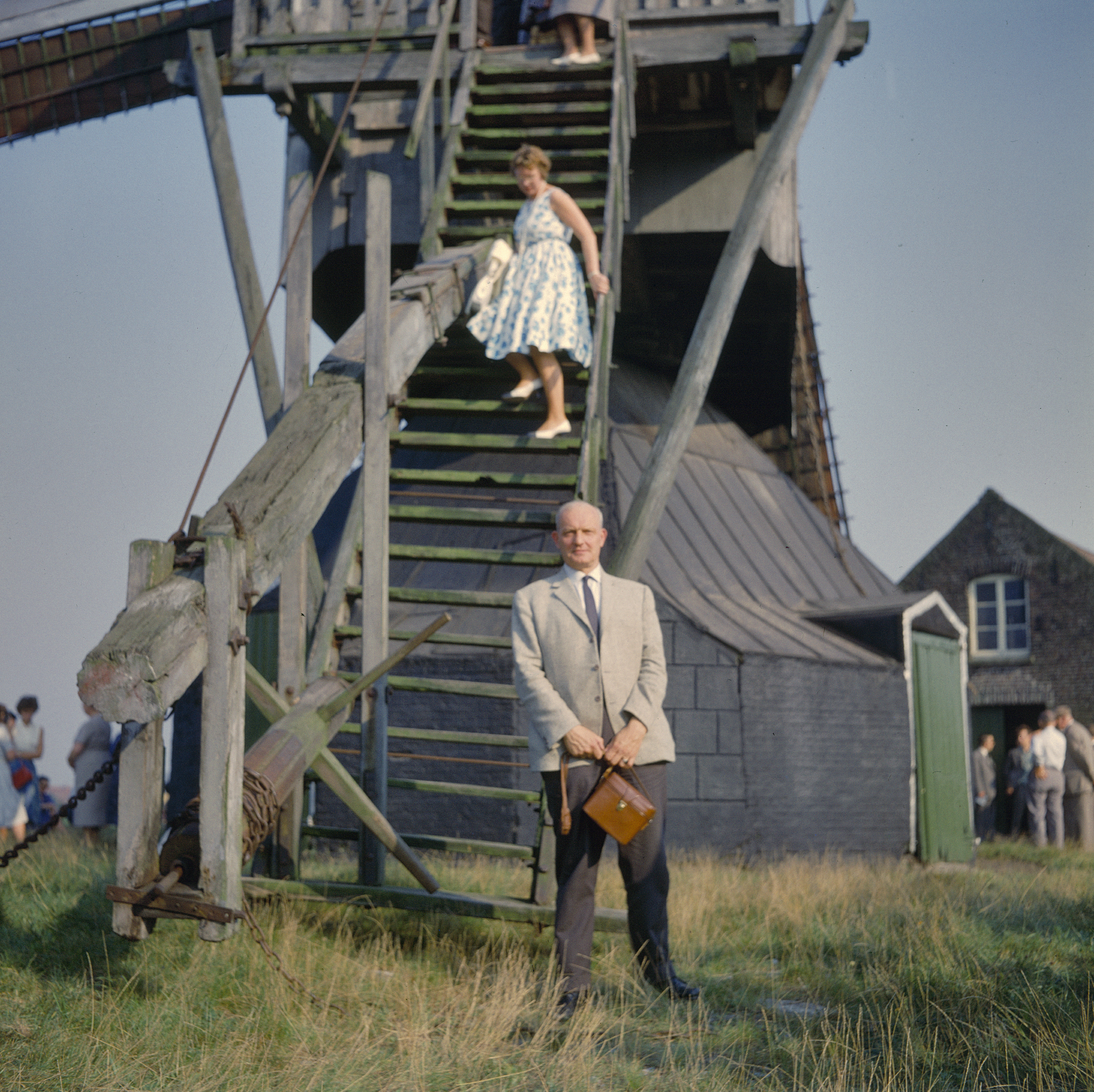 Sint Jan: De heer A. Bicker Caarten, toen hoofd Algemene Zaken van de RDMZ, staand voor de staart van de molen, tijdens een excursie van de Vereniging Hollandsche Molen (opmerking: Diacollectie Molens)